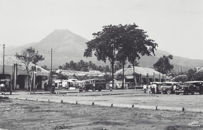 Foto. Gezicht op de markt in Batoe, met op de achtergrond de Goenoeng Panderman in de Residentie Malang